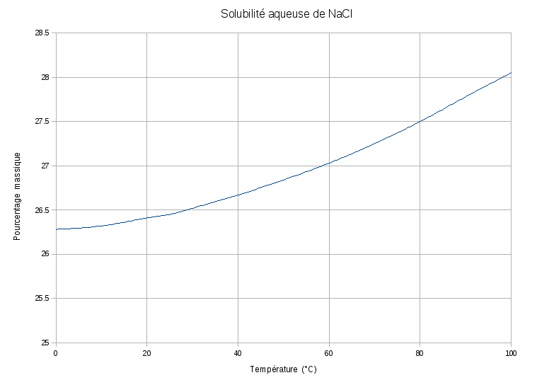 Solubilité aqueuse du chlorure de sodium